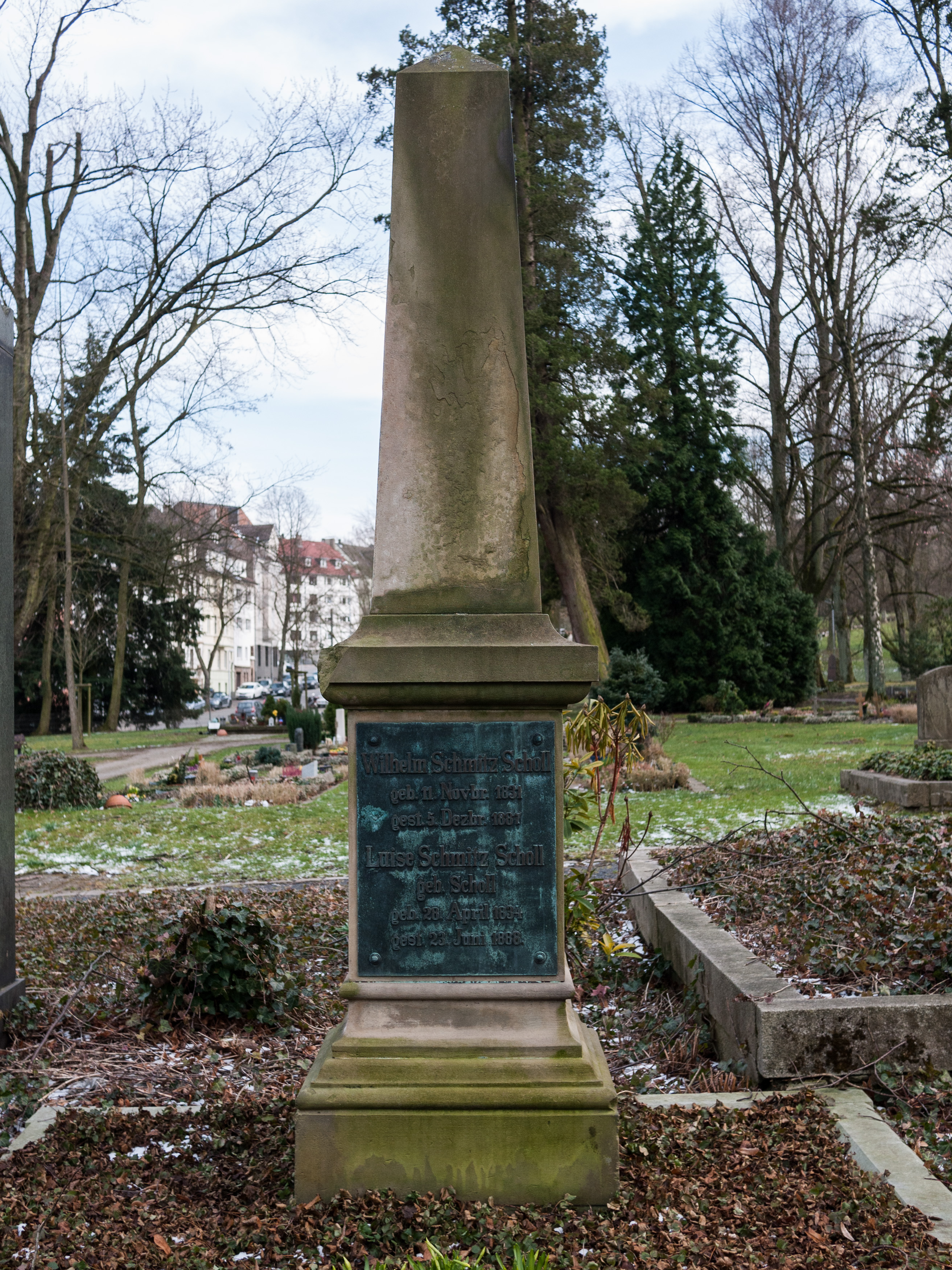 Grabmal Fam. Wilhelm Schmitz-Scholl auf dem Altstadtfriedhof in Mülheim an der Ruhr This is a photograph of an architectural monument.